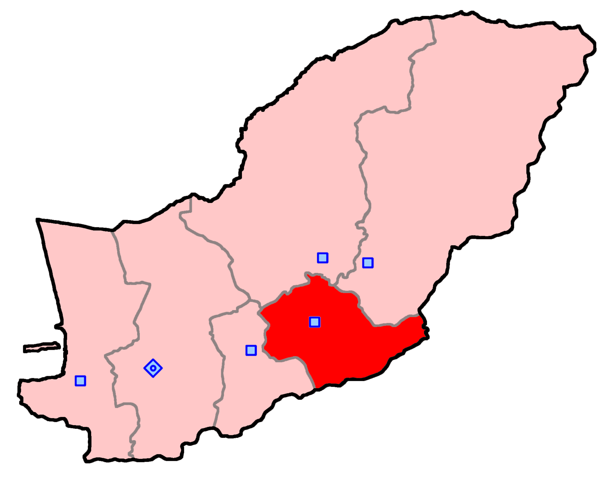 حوزه‌ رامیان برای انتخابات مجلس شورای اسلامی